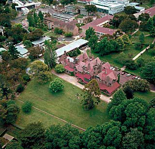 Université de New England, Armidale, Australie